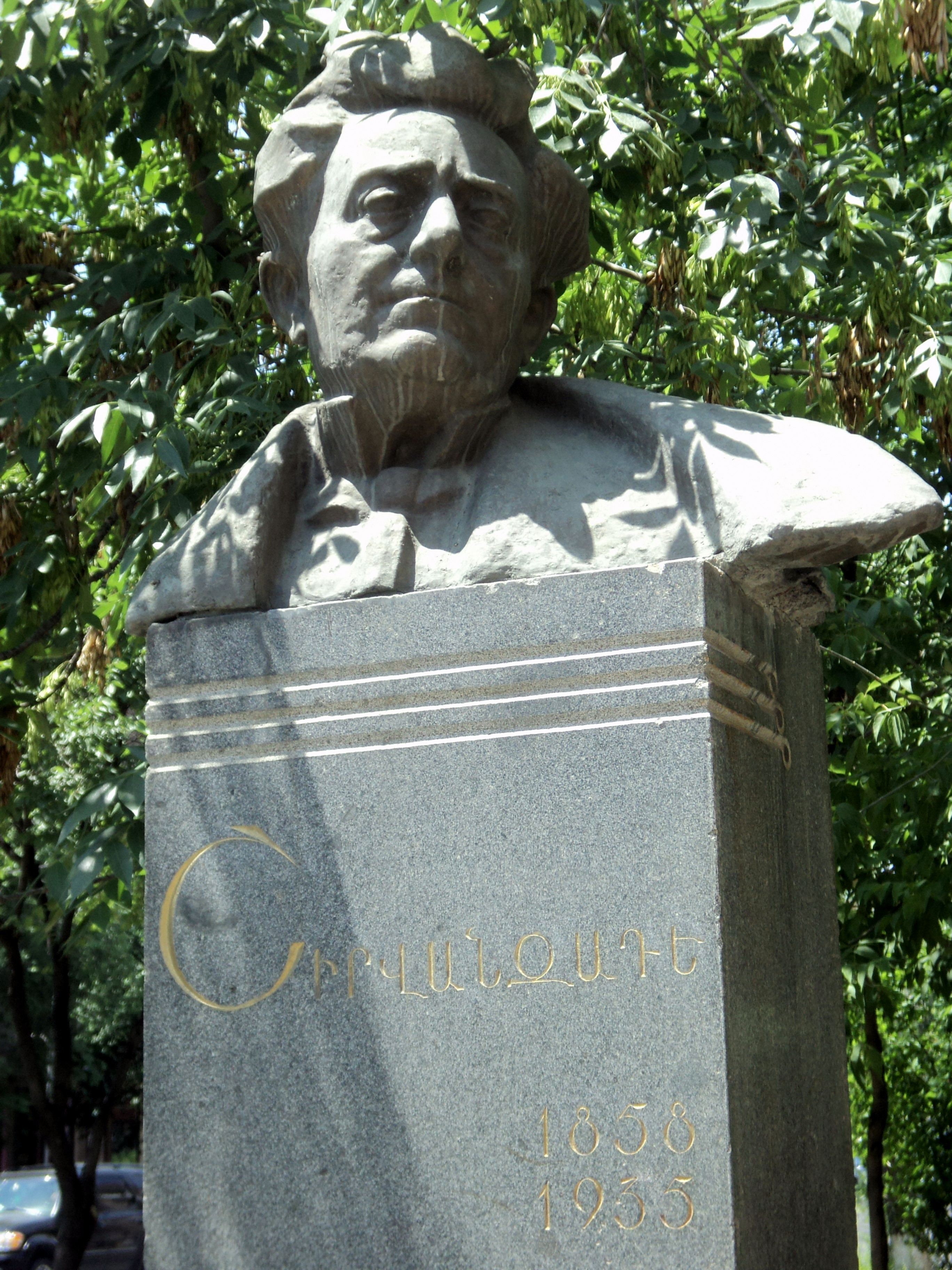 Շիրվանզադեի արձանը Փափազյան փողոցում` նրա անվան դպրոցի առջև: Քանդակագործ Արա Հարությունյան, 1957 3/12